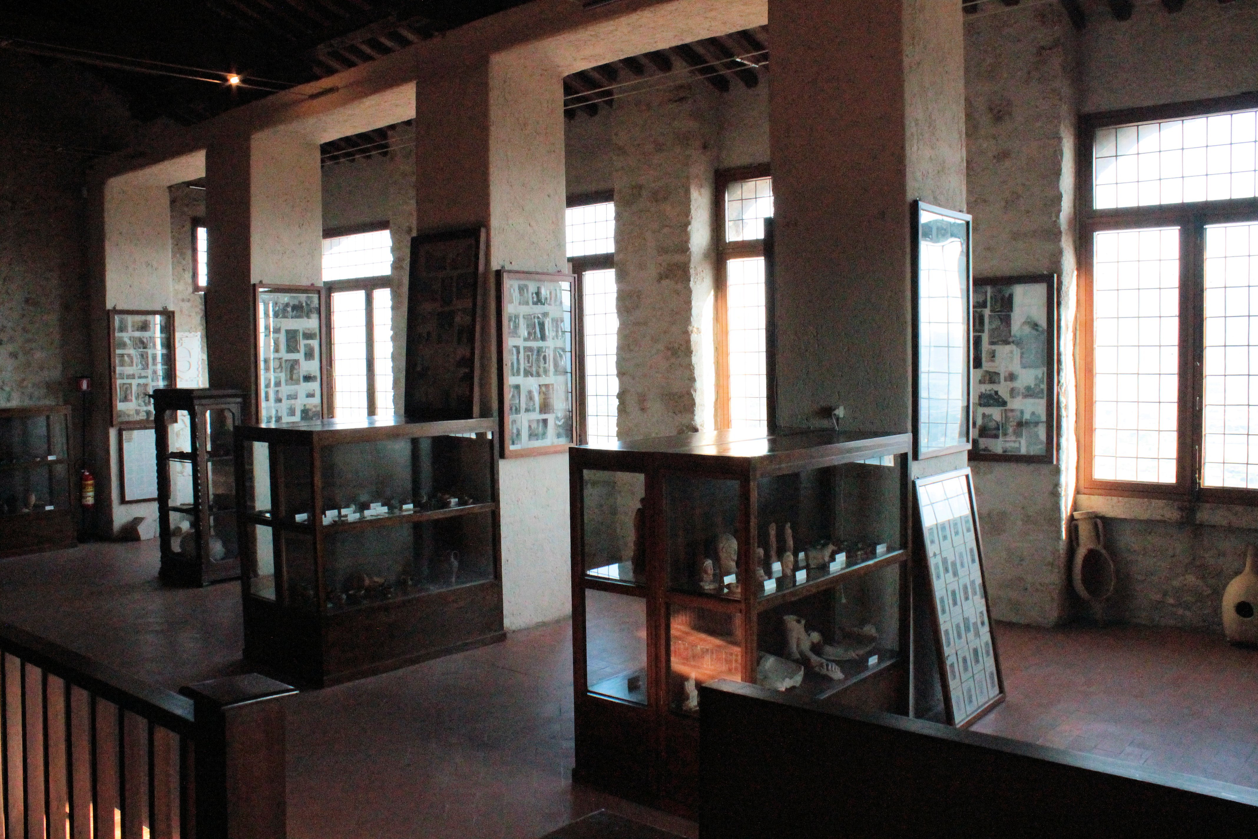 Museo bonifaciano e del Lazio meridionale, foto scattata in occasione dell'editathon tenutosi ad Anagni (FR) il 29-30 aprile 2017